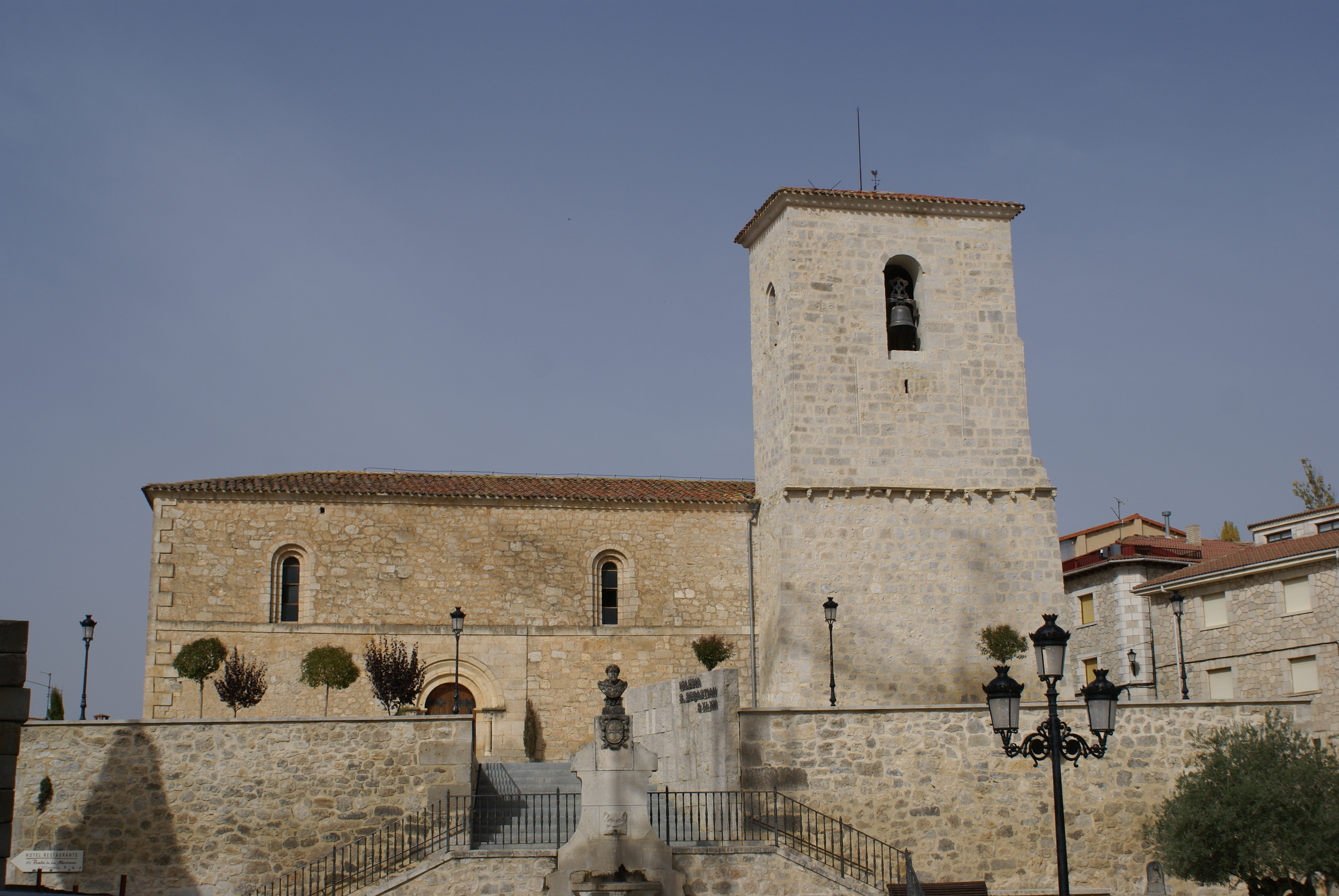 Iglesia de San Sebastián de Caleruega, Burgos.